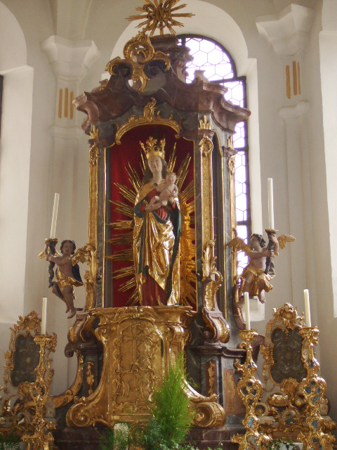 Ursberg, Klosterkirche, Madonnenfigur